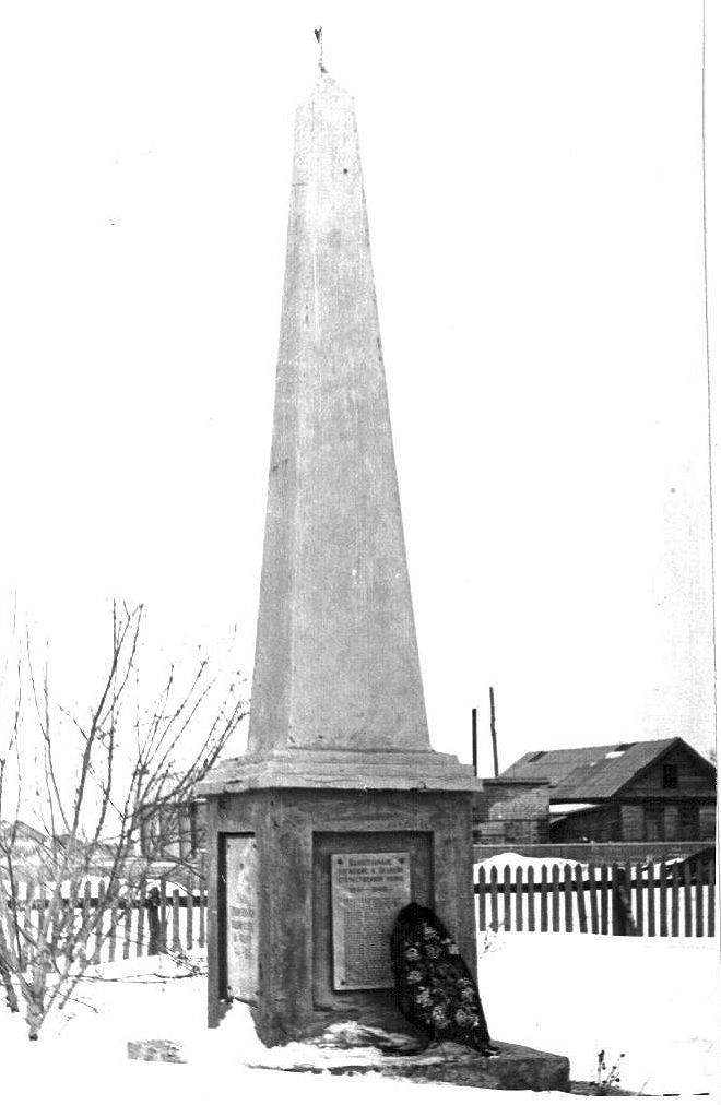 Обелиск погибшим воинам-односельчанам деревни Аминева Чишминского района, 1970-е года